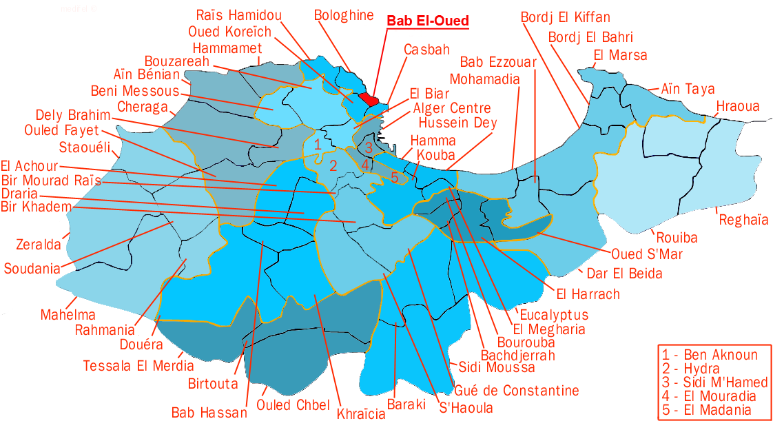 Adaptation par Utilisateur:Mogador99 de la création de Utilisateur:Medifel (original